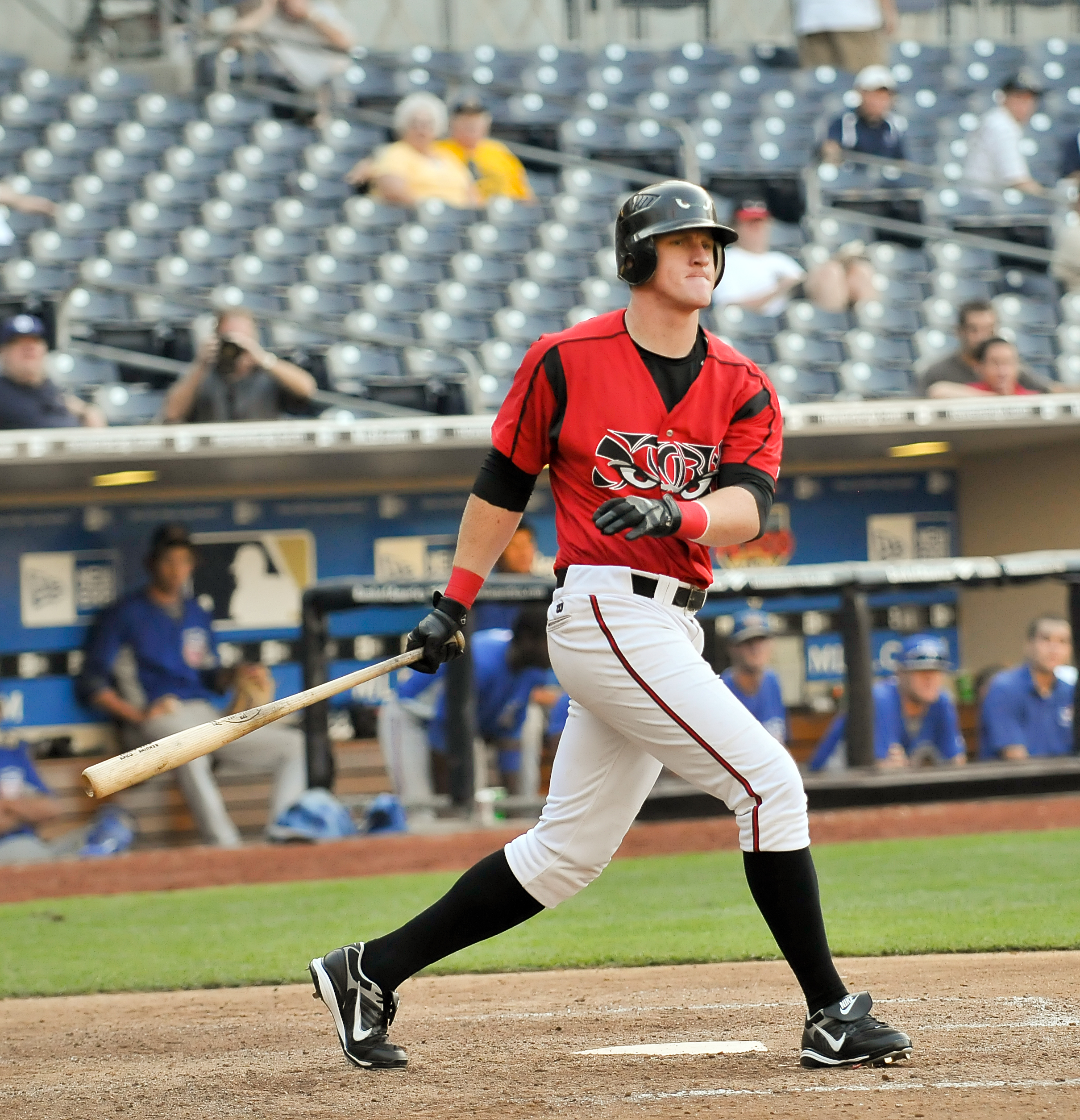 Allan Dykstra